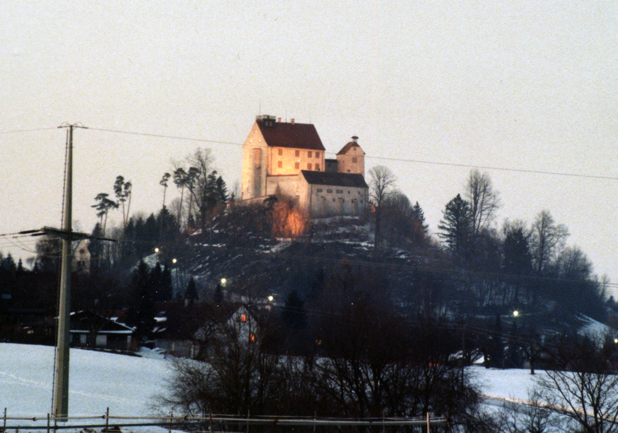 Die Waldburg im Winter, von Süden aus gesehen